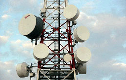 Parabolic Antennas Miguel Ferrando